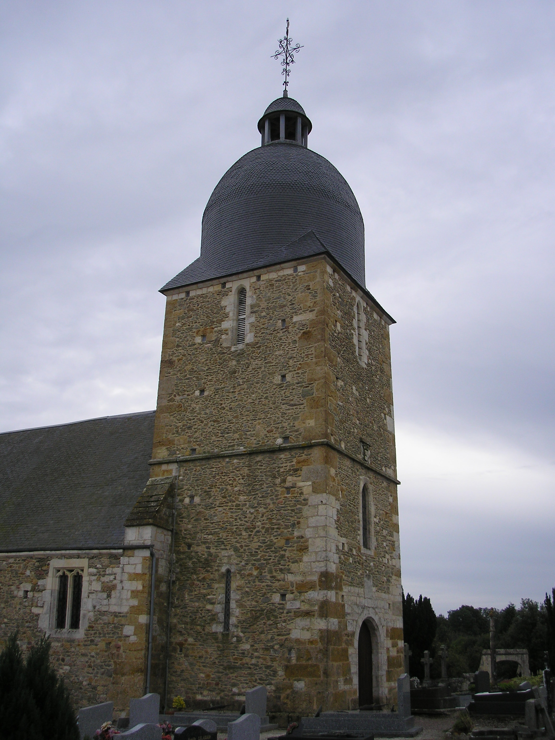 Donnay (Normandie, France). Le clocher de l'église Saint-Vigor.